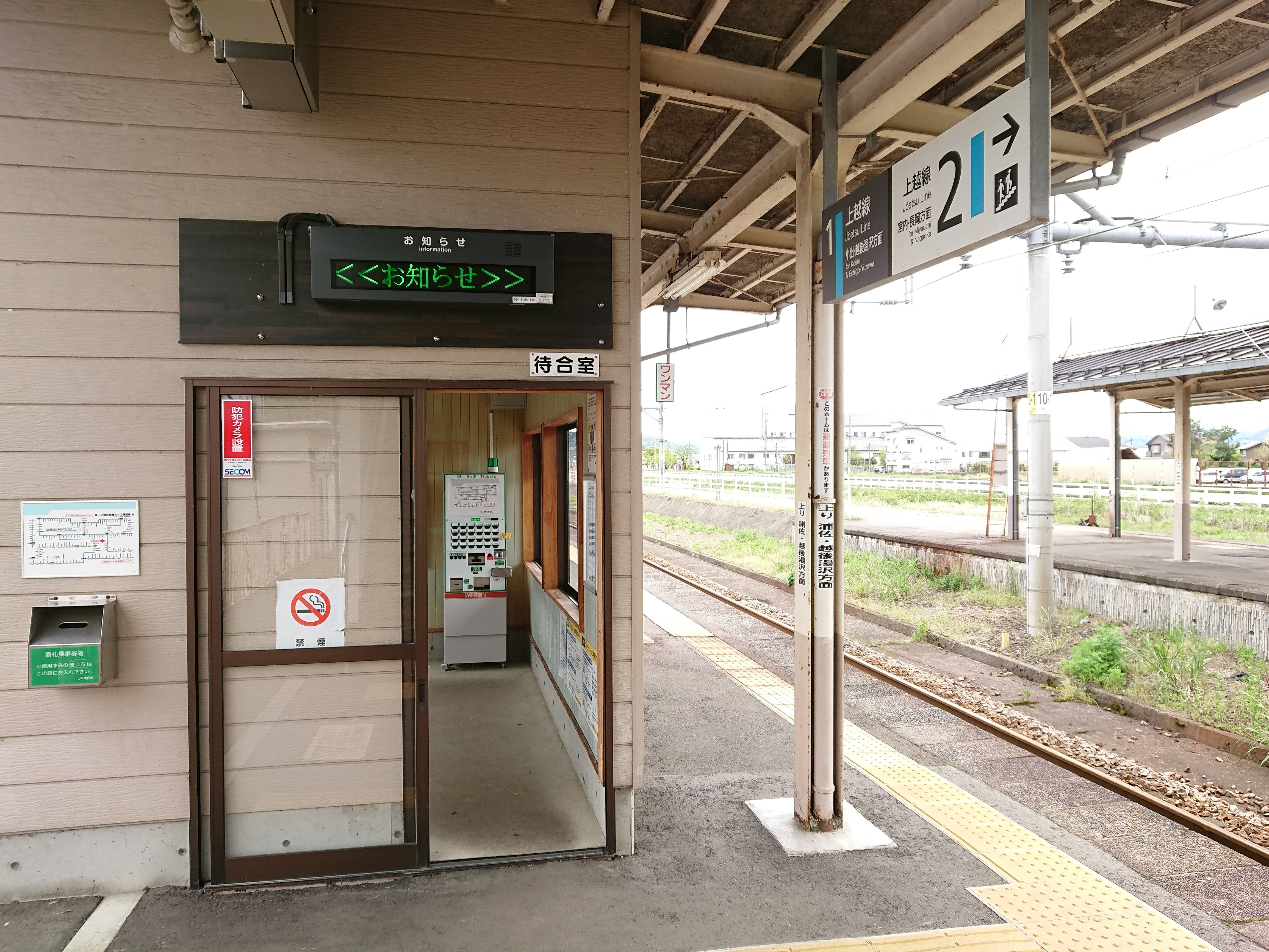 運行情報表示器設置後の越後滝谷駅構内、自動券売機も設置されている。